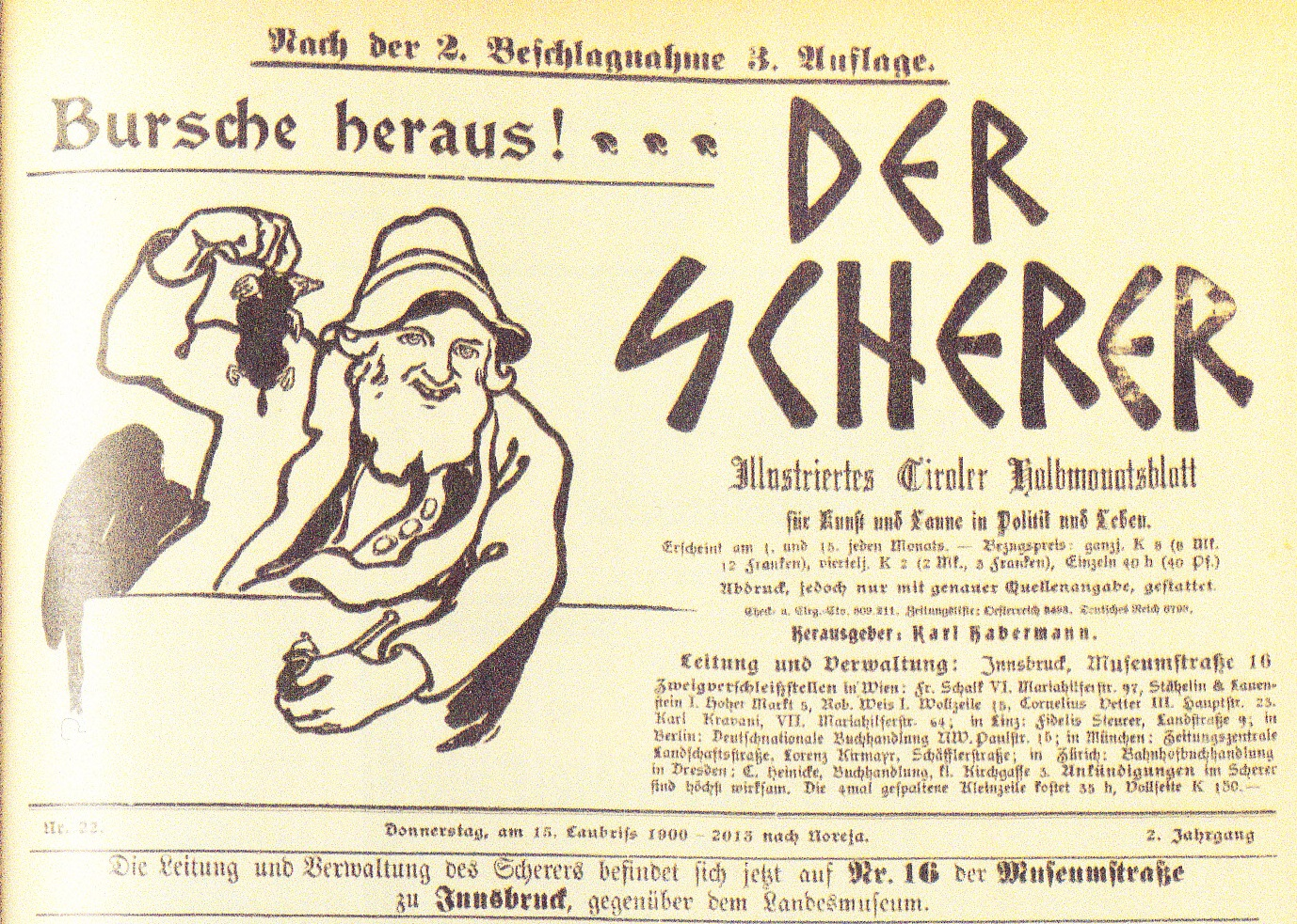 Kopftitel der Zeitschrift "Der Scherer" 1900 - 1906